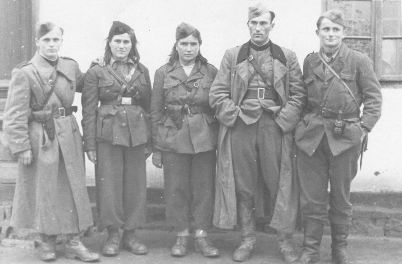 Grupa boraca Prve ličke brigade, krajem septembra 1944. godine, u Mionici kod Valjeva. Drugi s desna Miloš Čanković, zamenik komandanta brigade,treća s desna Nada Erar, referent saniteta II bataljona, prvi s leva Dane Sekulić politički komesar II bataljona